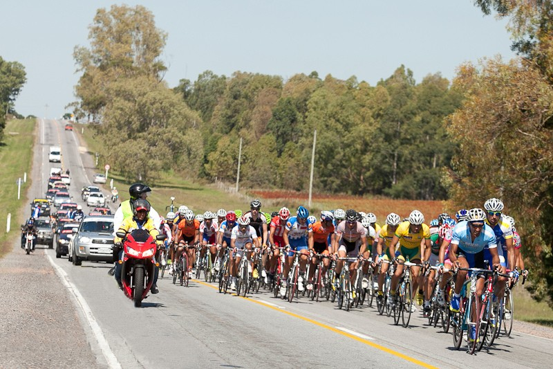 Pelotón de la Vuelta Ciclista del Uruguay 2012